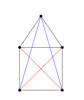 Grafo hamiltoniano semejante a una casa(Parte 2)